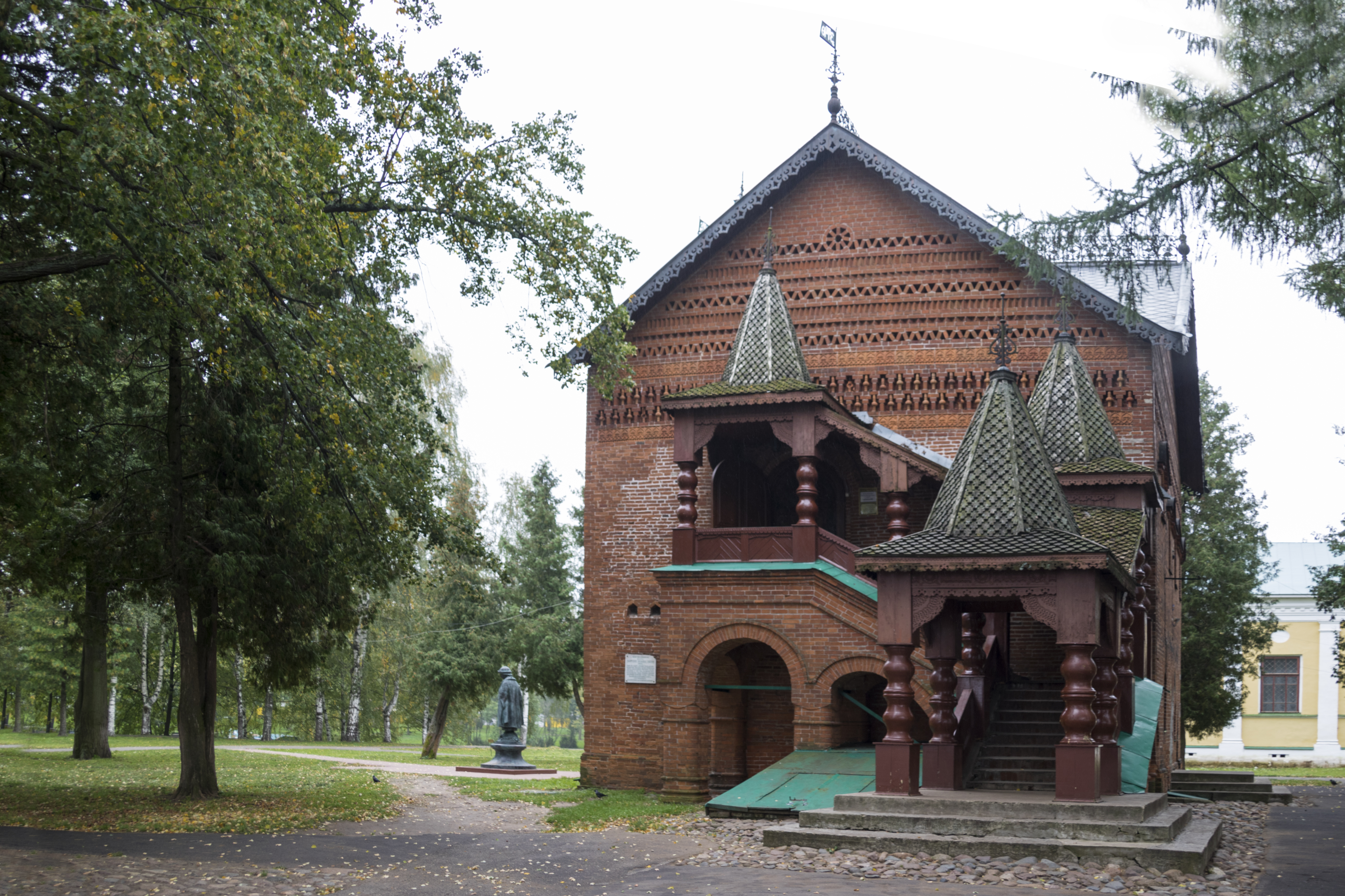 Палаты царевича Дмитрия (Палаты угличских князей): улица Кремль, 4, Углич, Ярославская область